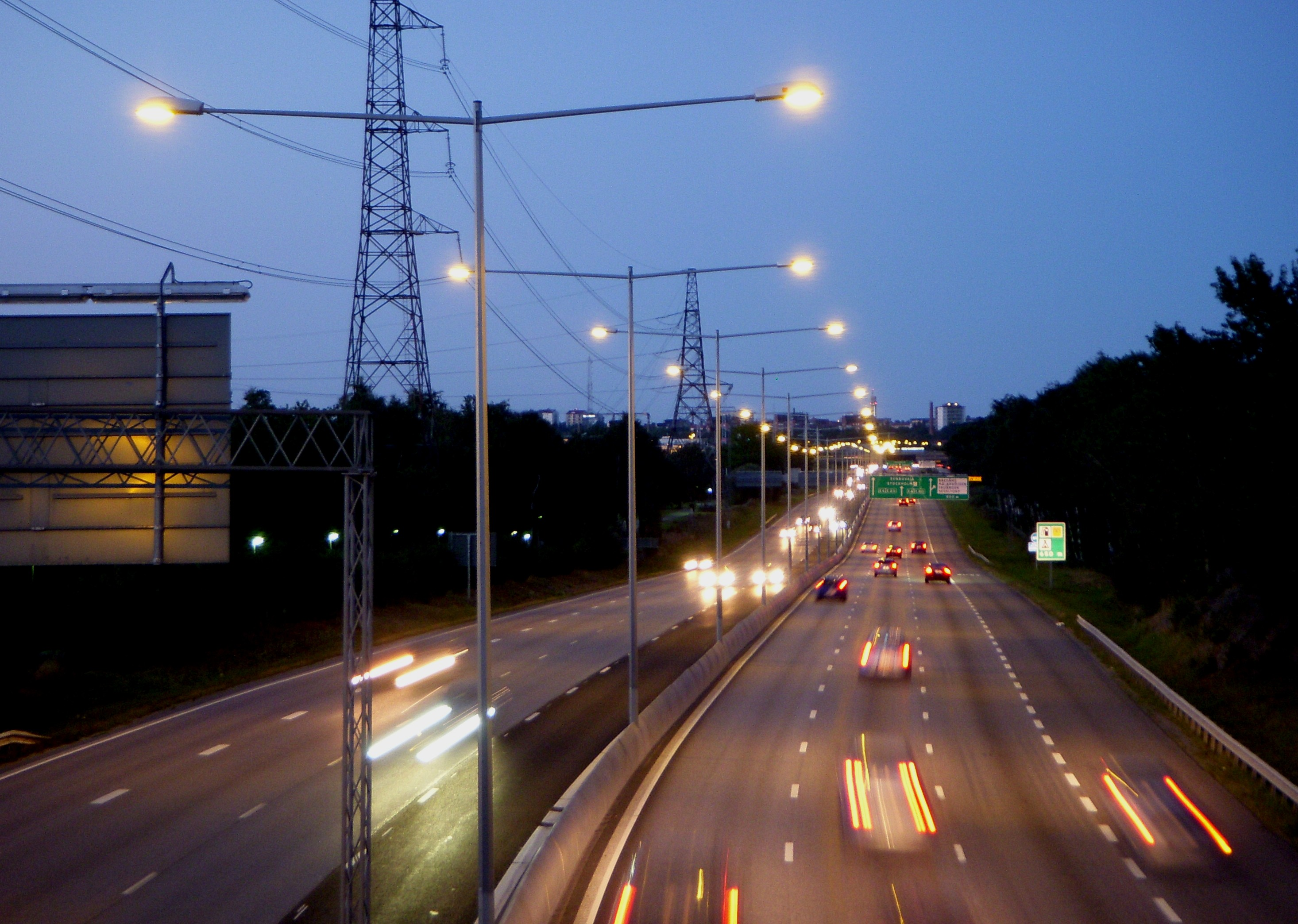 Belysning på Södertäljevägen E4/E20, vid trafikplats Bredäng